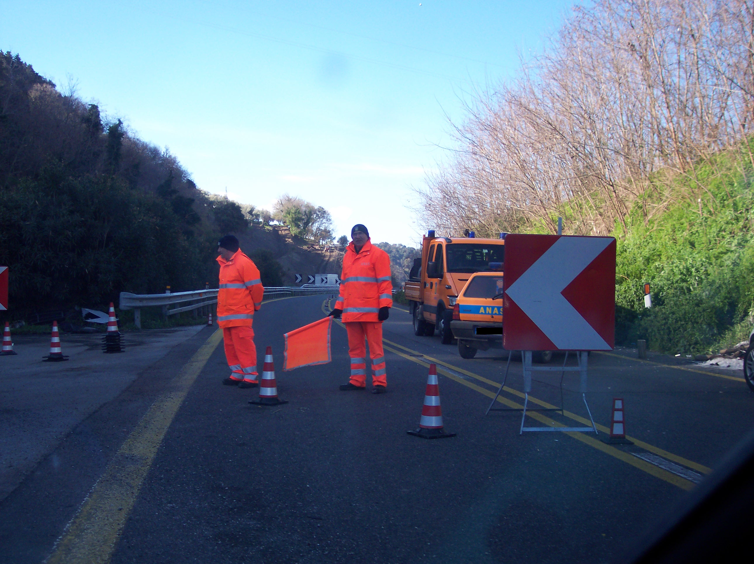 Operai ANAS sull'autostrada A3 Salerno-Reggio Calabria, al km 299 in direzione Reggio Calabria, tra le uscite di San Mango d'Aquino e Falerna. Addetti ai lavori di manutenzione straordinaria.